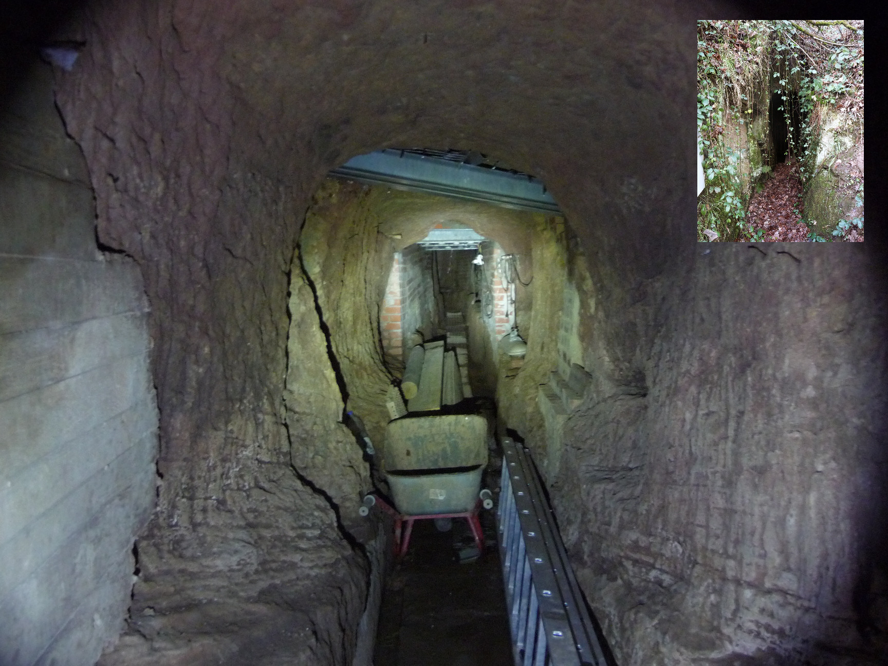 In der Nähe des Emilianus-Stollens. Azurit-Abbau in römischer Zeit, im Mittelalter und z.T. in der Neuzeit.